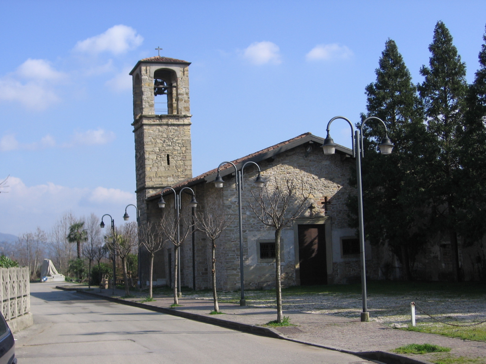 La chiesa di San Pietro a Mezzate, frazione di Bagnatica.